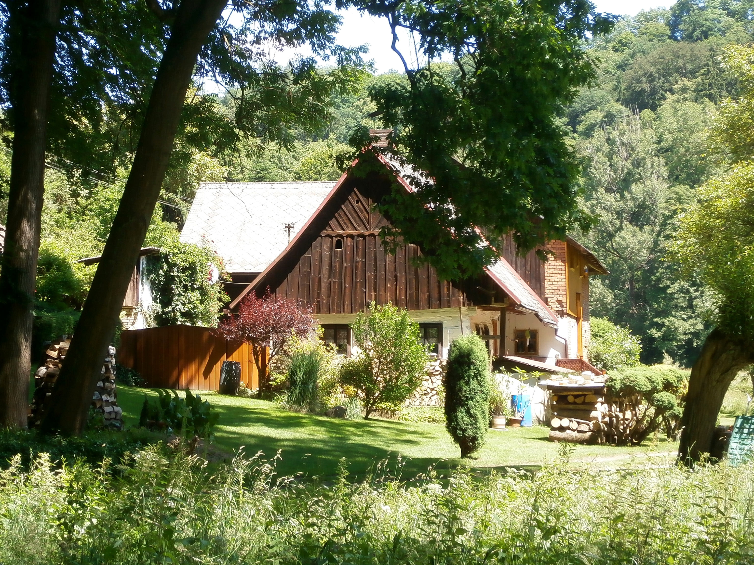 Žernov čp. 91